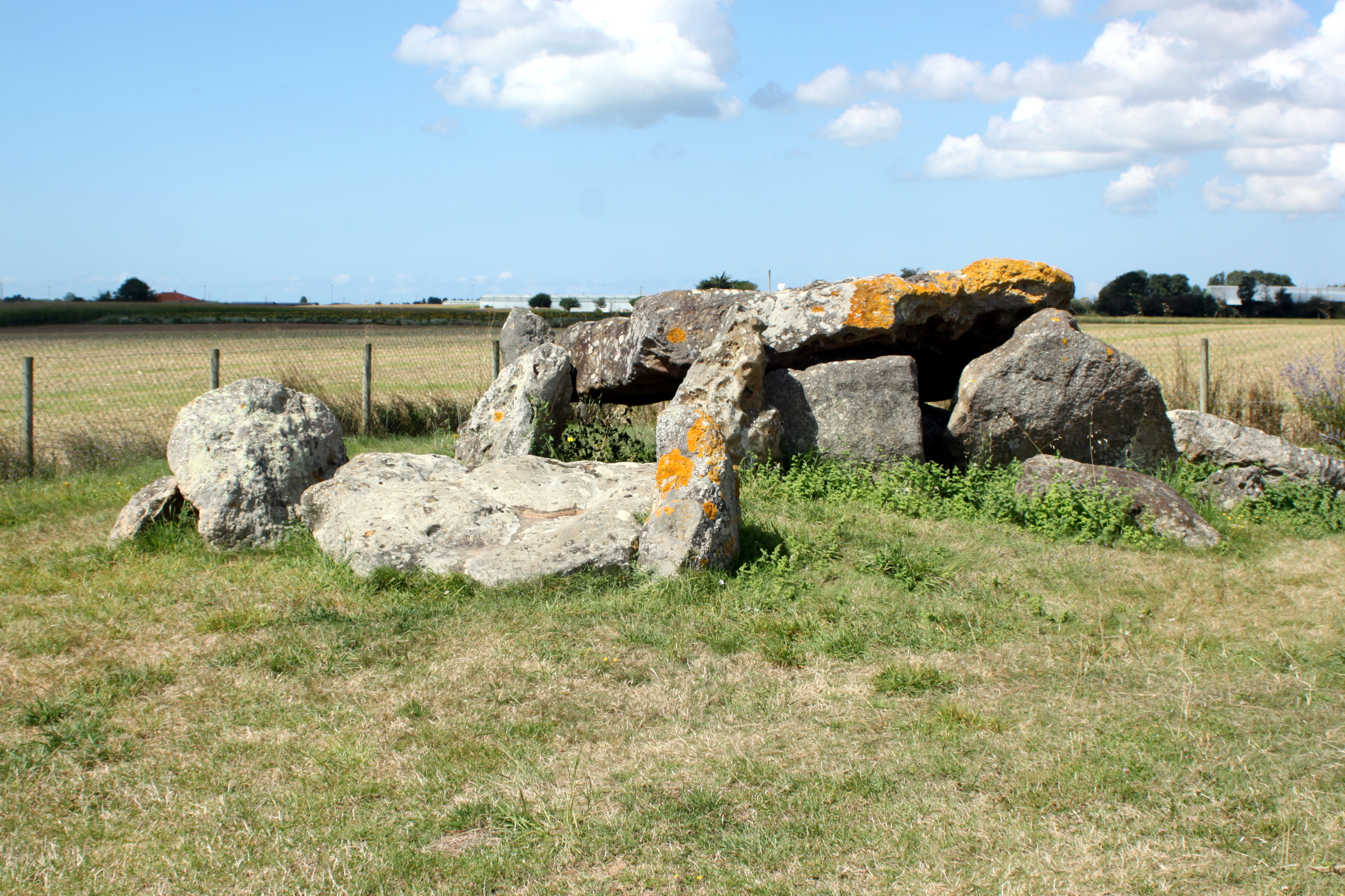 Dolmen du Grand-Bouillac, Fr-85-Saint-Vincent-sur-Jard. .